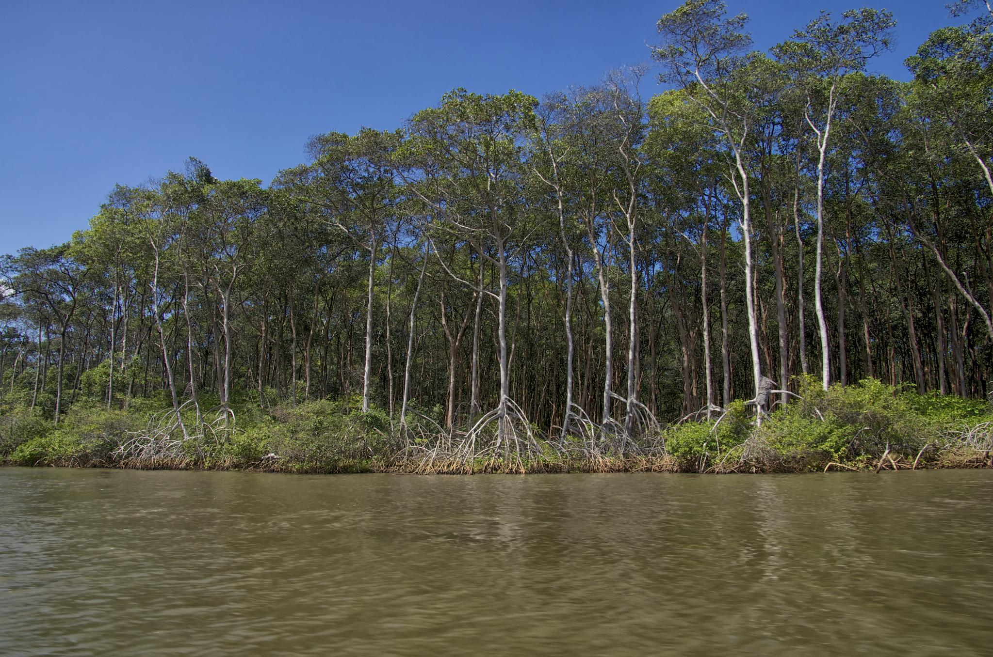 Pelos caminhos do Rio Preguiças